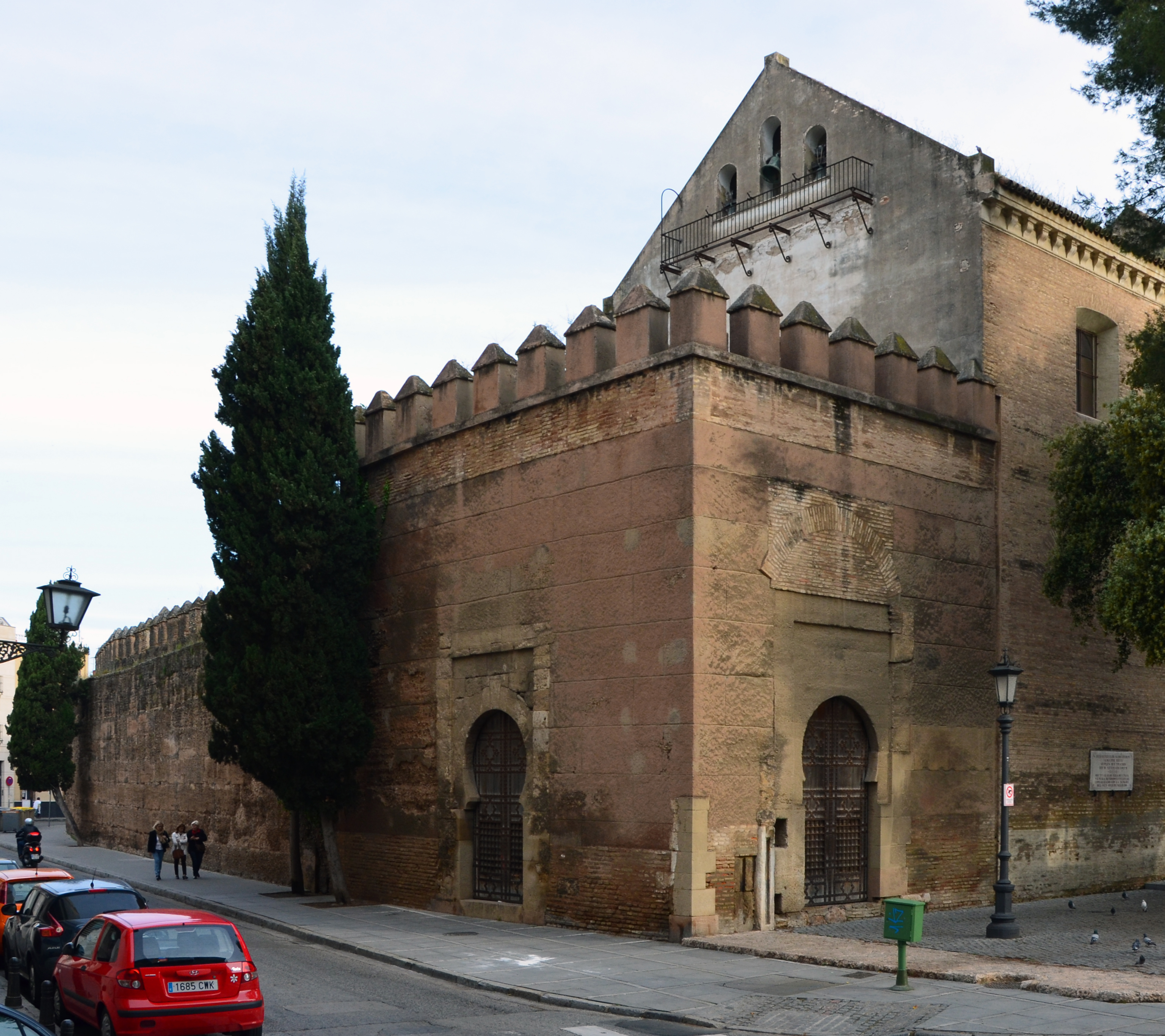 La porte de Cordoue (puerta de Córdoba) de Séville (Espagne). Porte de ville almoravide, reconstruite au XVIe siècle et très peu modifiée depuis, elle montre encore l'aspect fermé et militaire des portes d'origine. Elle se trouve à l'angle entre les rues Puerta de Córdoba et Madre Dolores Márquez, au nord de l'enceinte.